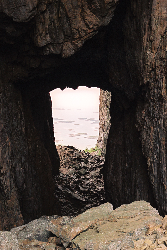 Hullet i Torghatten, sett vestover.